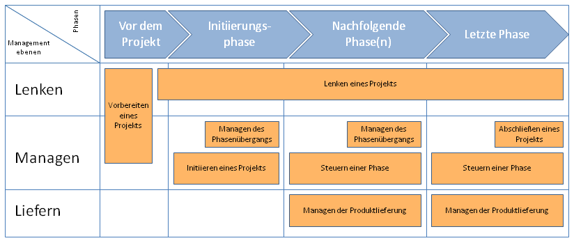 Diagramm zu den PRINCE2-Prozessen (PRINCE2 2009)